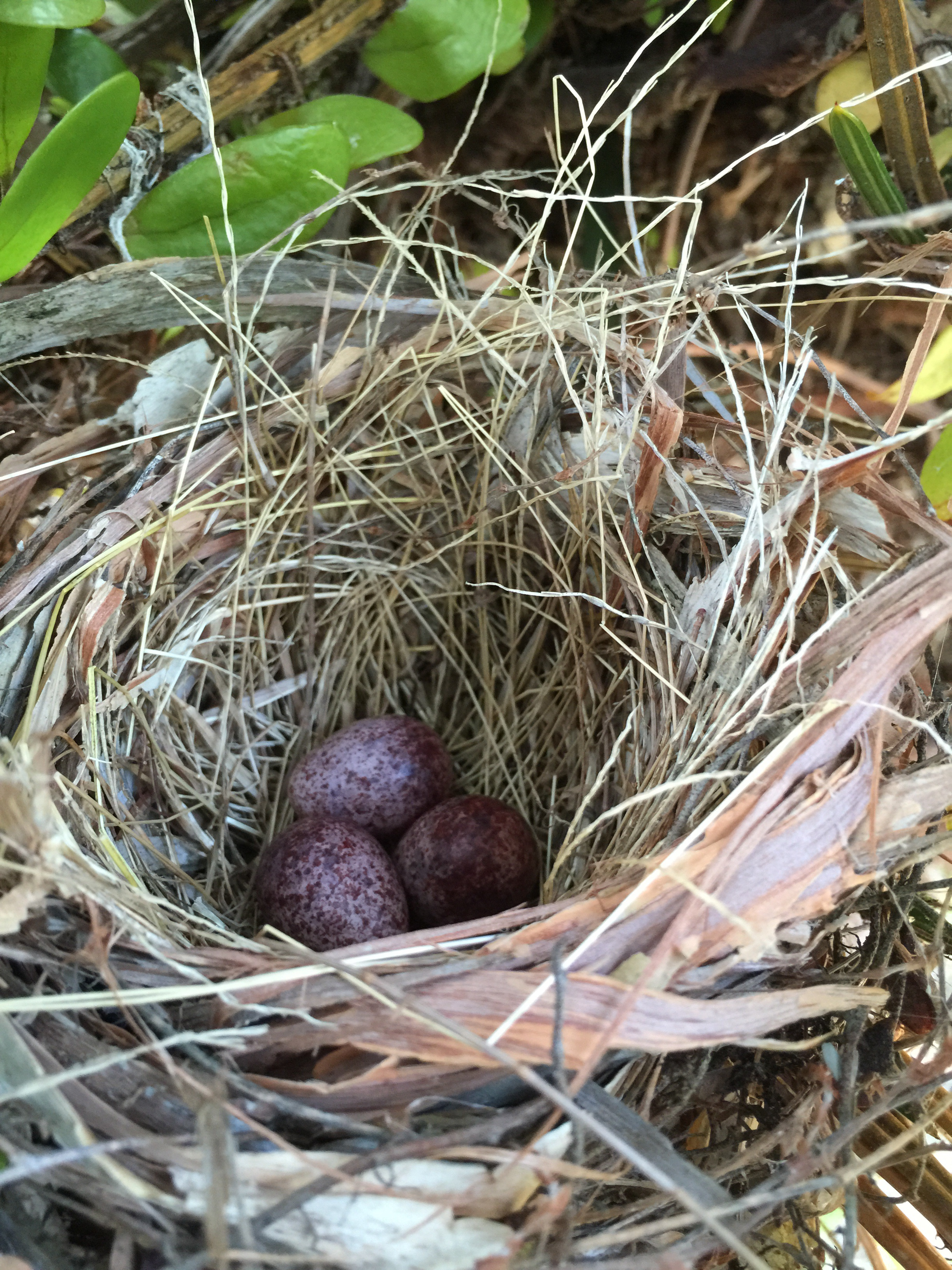 Sarang burung merbah kapur